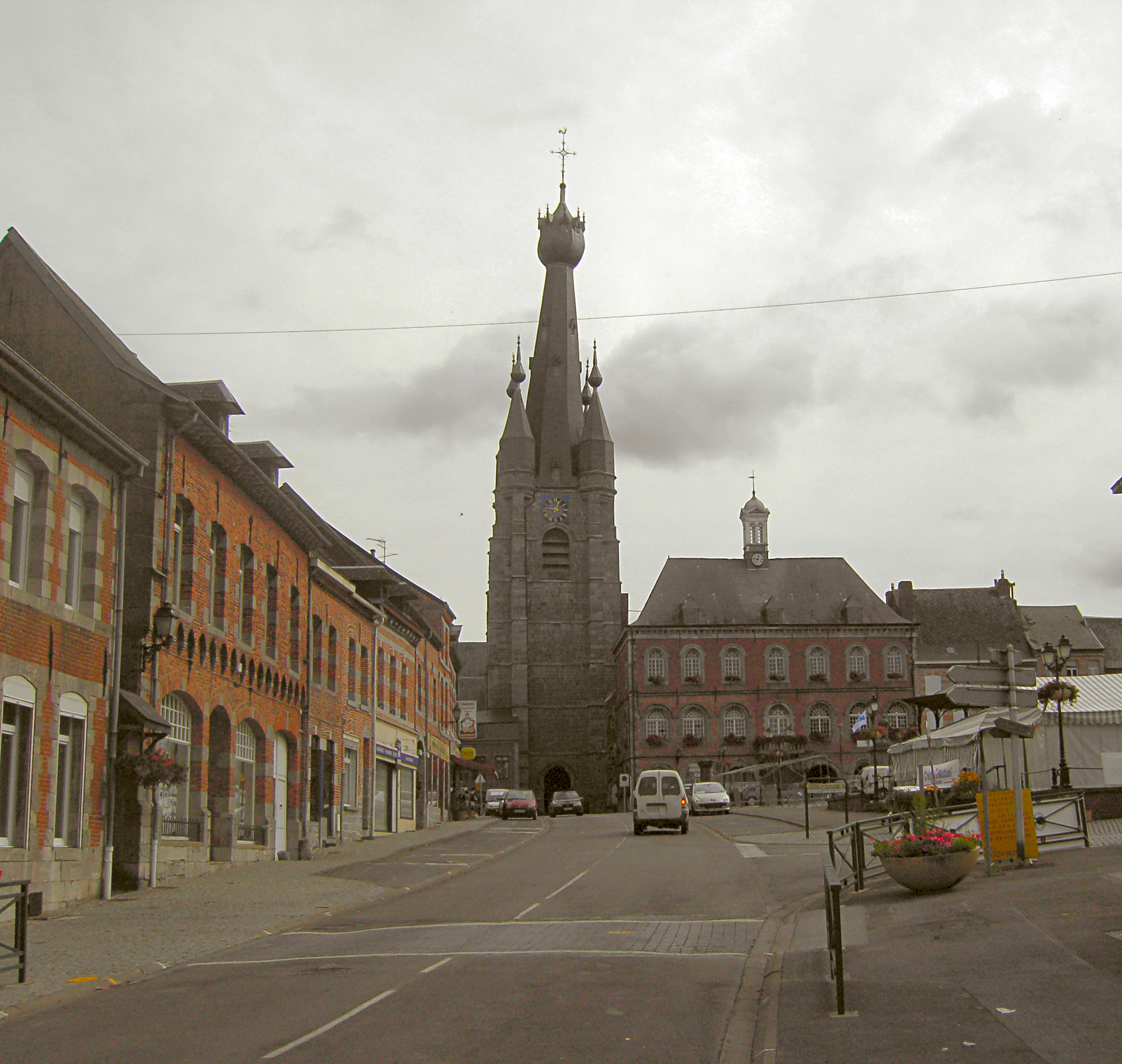 Solre-le-Château - église et hôtel de ville